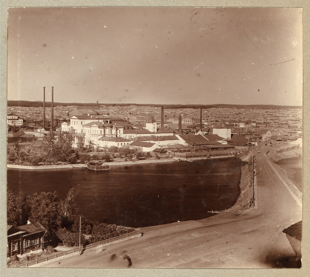 Пермская губерния, Екатеринбургский уезд. Кыштым. Вид на Кыштымский завод и господский дом.